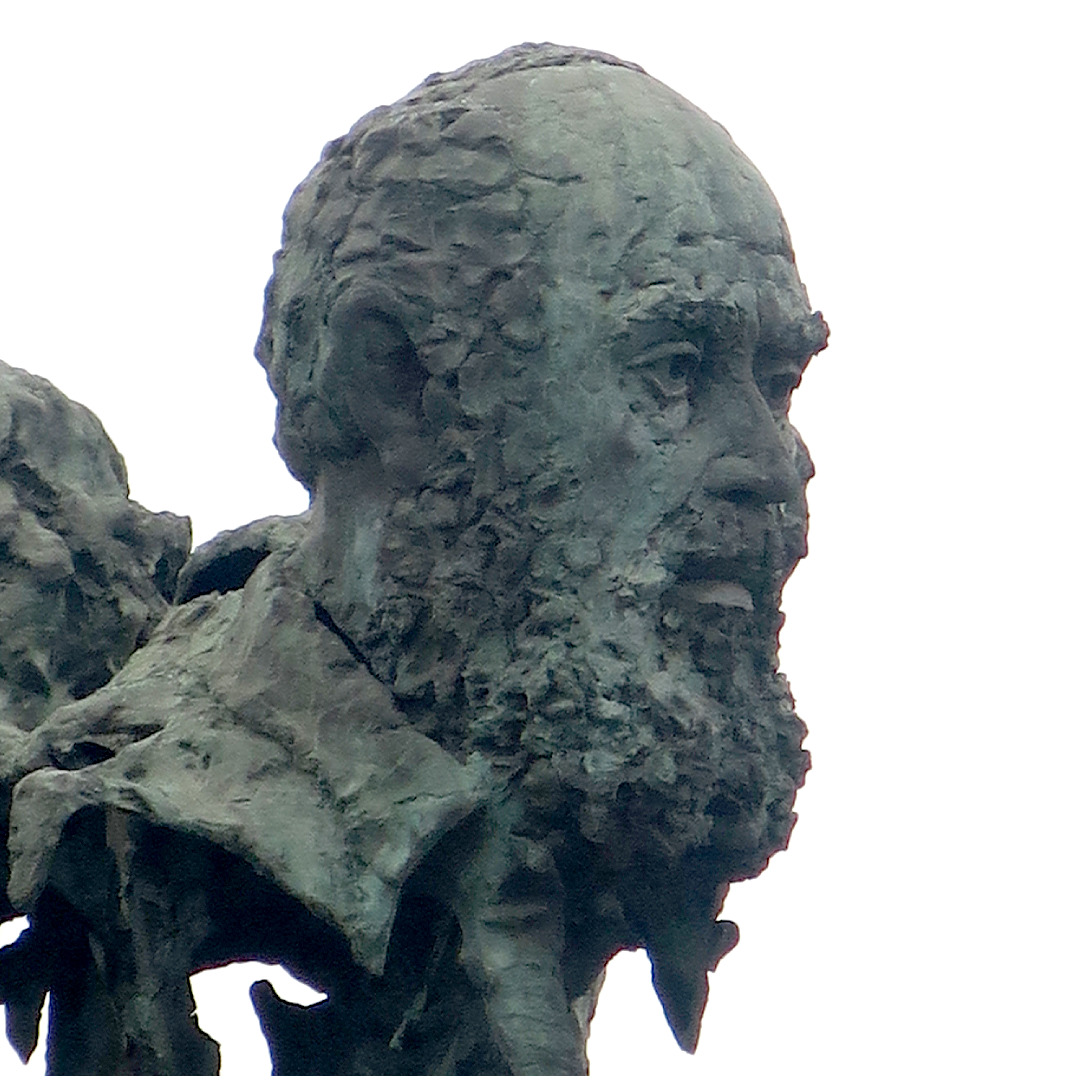 Luis Martínez Giraldo. Monumento a los tres poetas, inaugurado el 12 de noviembre de 2003. Badajoz. Luis Álvarez Lencero.